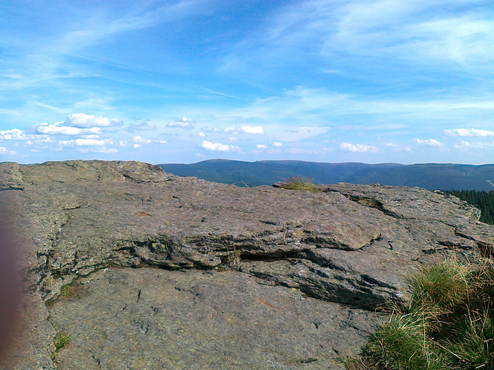 Widok ze skaliska szczytowego góry Vozka - 1377 m n.p.m. w kierunku góry Pradziad - 1491 m n.p.m.